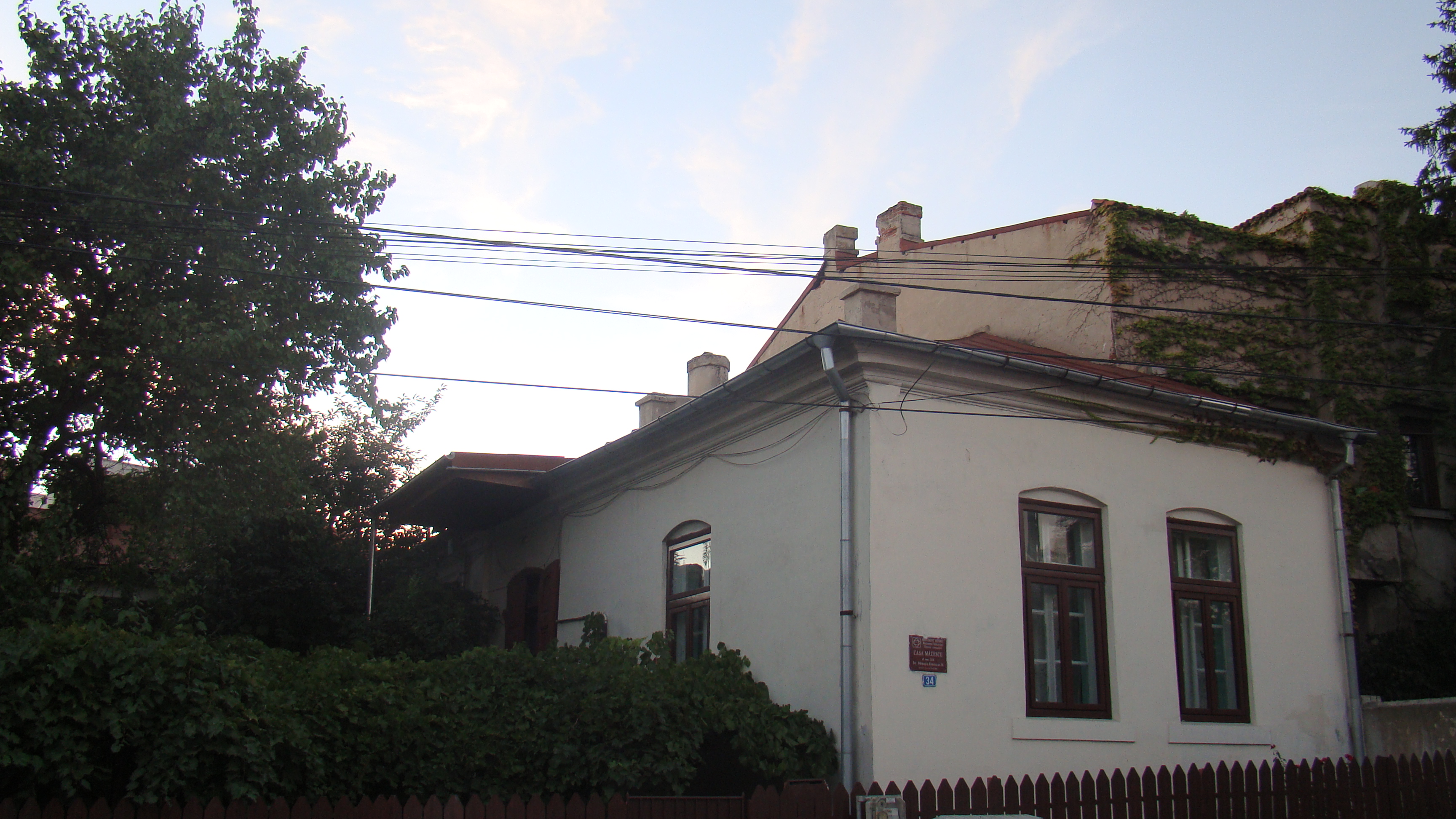 Casa Măcescu